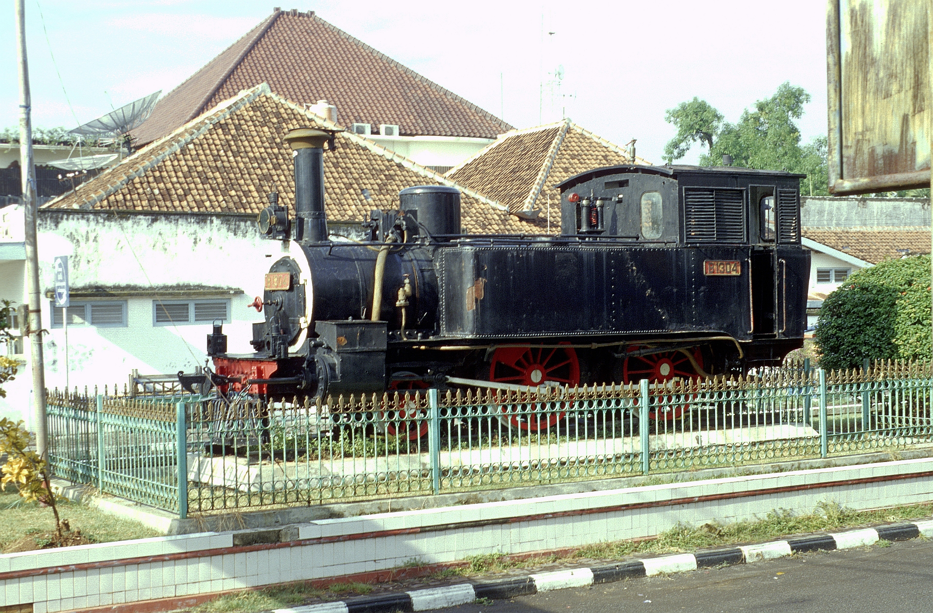 DKA B13 (B)